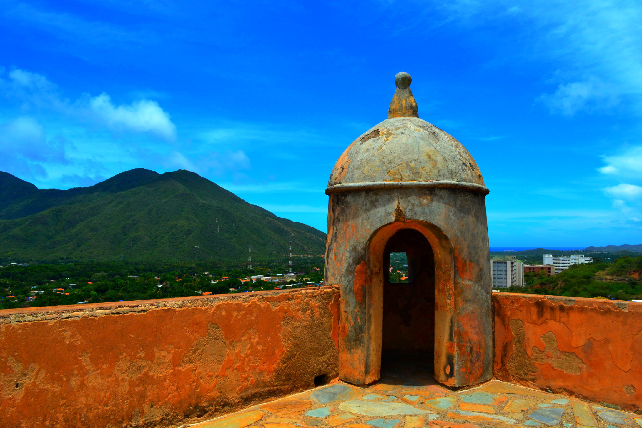 Castillo de Santa Rosa de la Eminencia en la Asunción, Estado Nueva Esparta (Margarita), Venezuela.